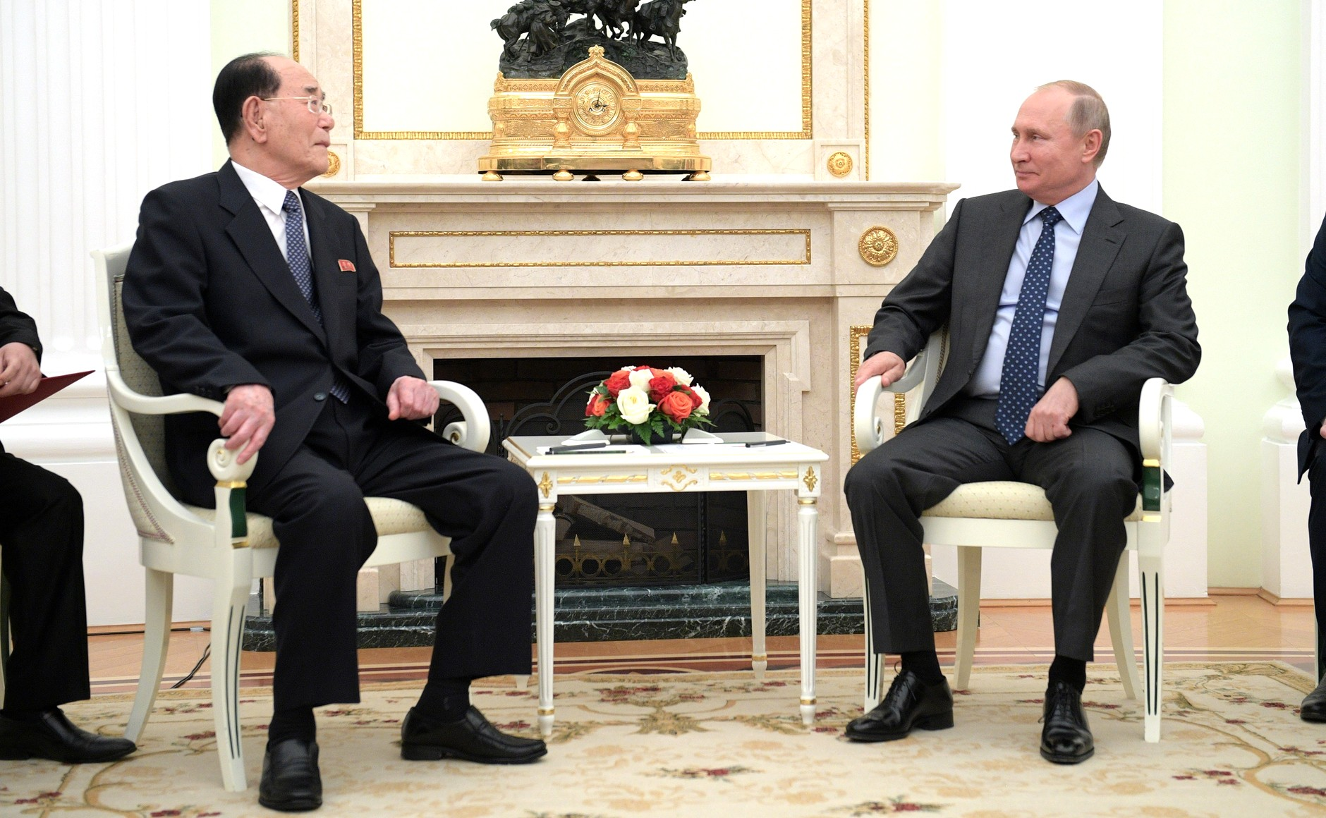 Встреча Президента России Владимира Путина с Председателем Президиума Верховного народного собрания Корейской Народно-Демократической Республики Ким Ён Намом